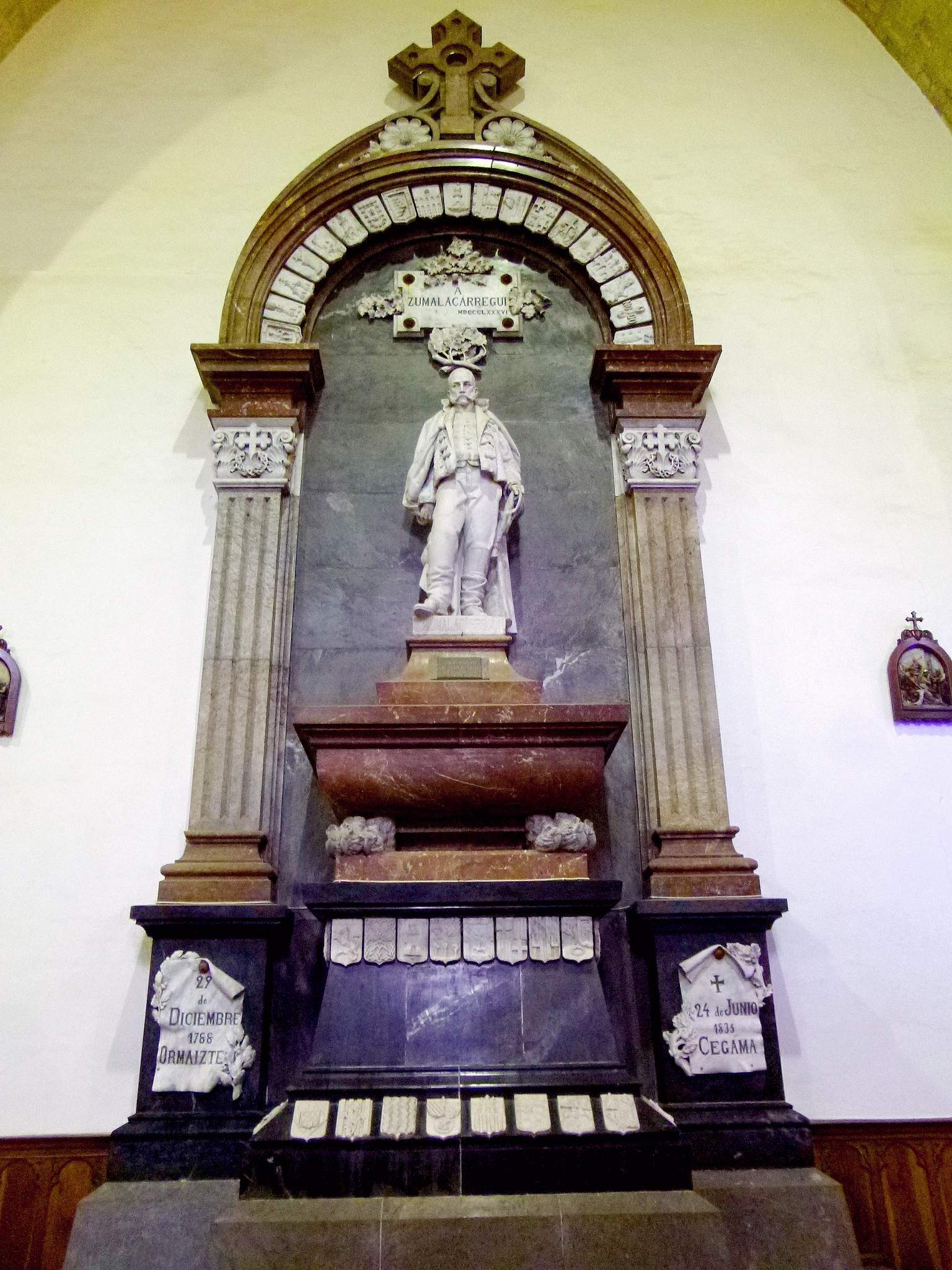 Zegama - Iglesia de San Martín de Tours, interiores, mausoleo de Zumalacárregui